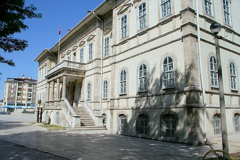 Atatürk Kongre ve Etnografya Müzesi, Sivas